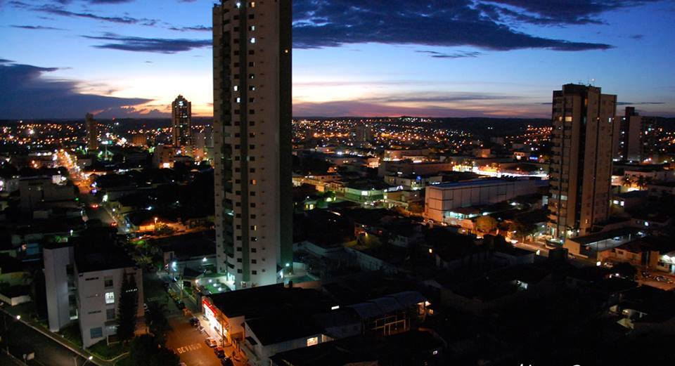 Zona Central